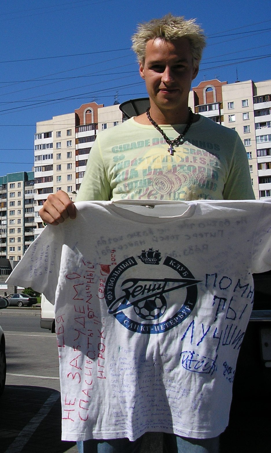 Мартин Горак с подарком от болельщиков "Зенита" перед переходом в ФК "Ростов"